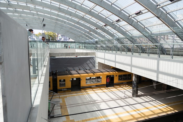 La estación Constitución de la linea C del subte porteño, con su nuevo techo tras la inauguración del centro de trasbordo.